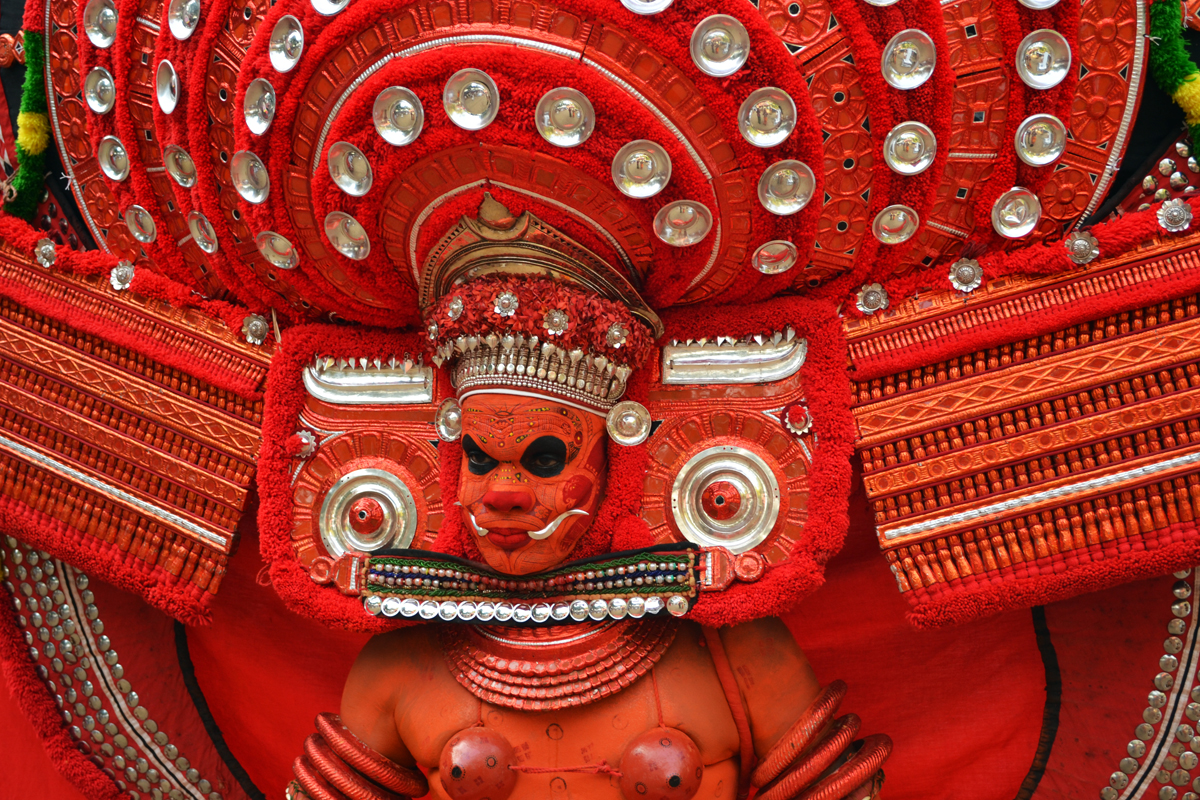 പുള്ളൂർ കാളി അല്ലെങ്കിൽ പുലിയൂർ കാളി